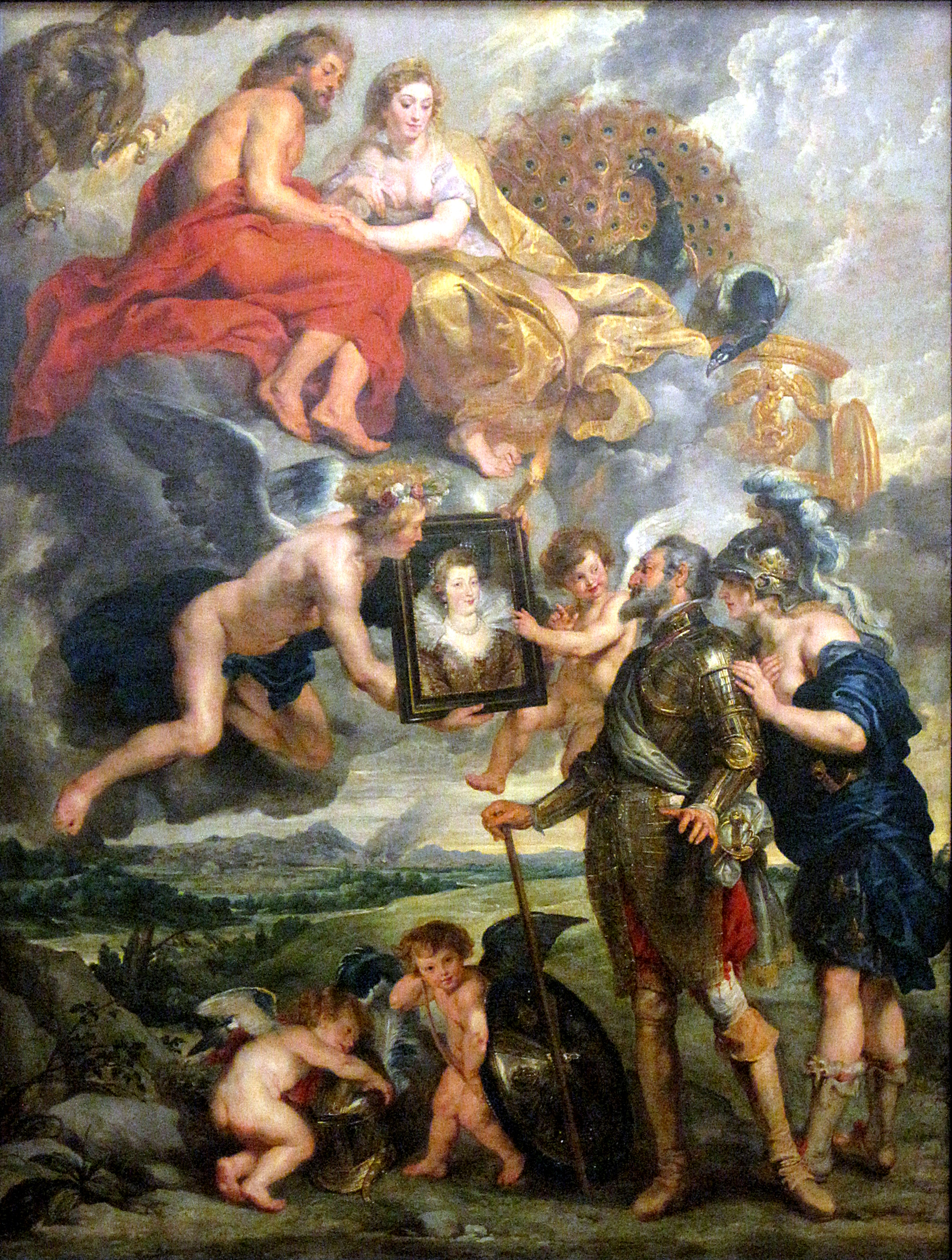 Peinture fiamande au Louvre, Paris